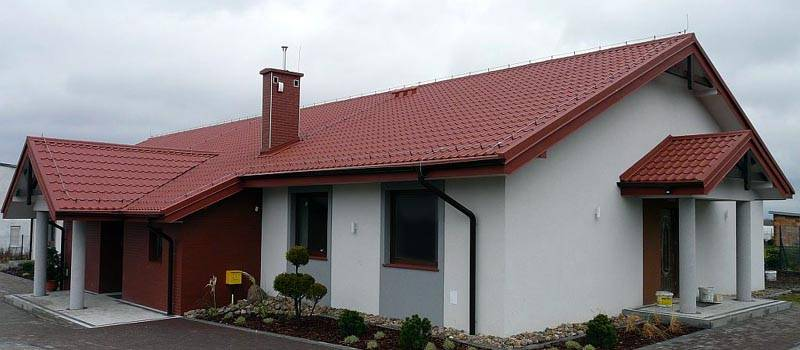 Czarlin - Sala Królestwa Świadków Jehowy w Tczewie - Zarejestrowany Związek Wyznania Świadków Jehowy w Polsce